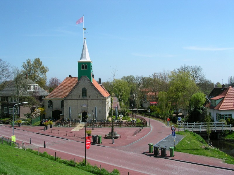 Buurtjeskerk, de kerk van de buurtschap Kerkbuurt, Andijk. Buurtjeskerk. the church of the hamlet Kerkbuurt, Andijk.